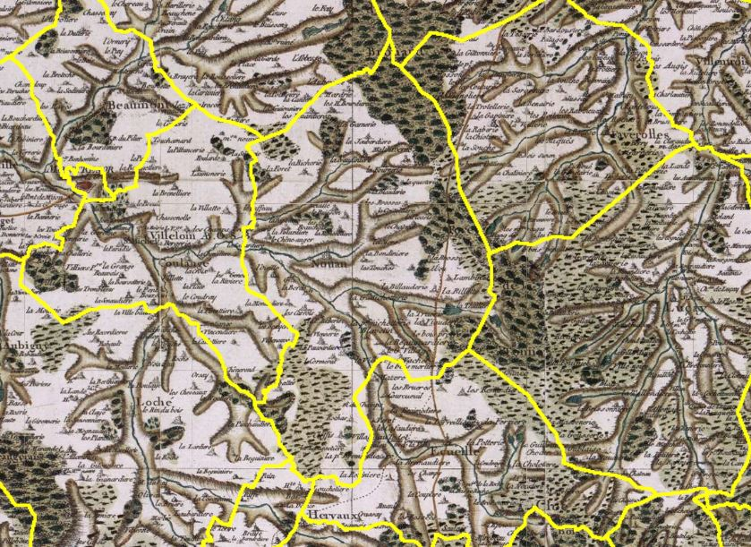 Nouans-les-Fontaines sur un extrait de la carte de César-François Cassini.